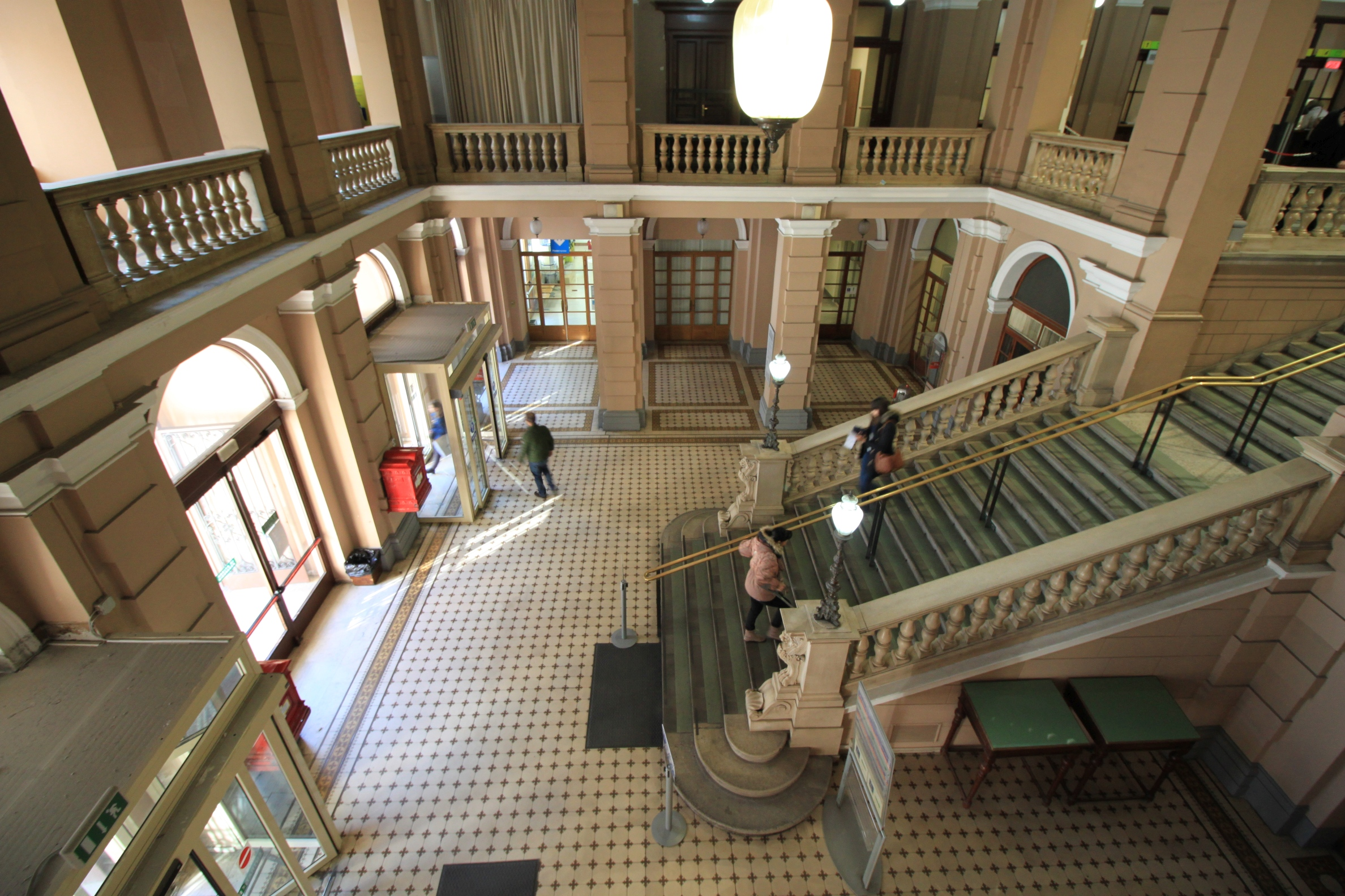 Palazzo delle Poste, Piazza Vittorio Veneto, Trieste; Interiore